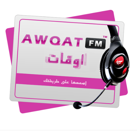 شعار راديو اوقات اف ام الجديد